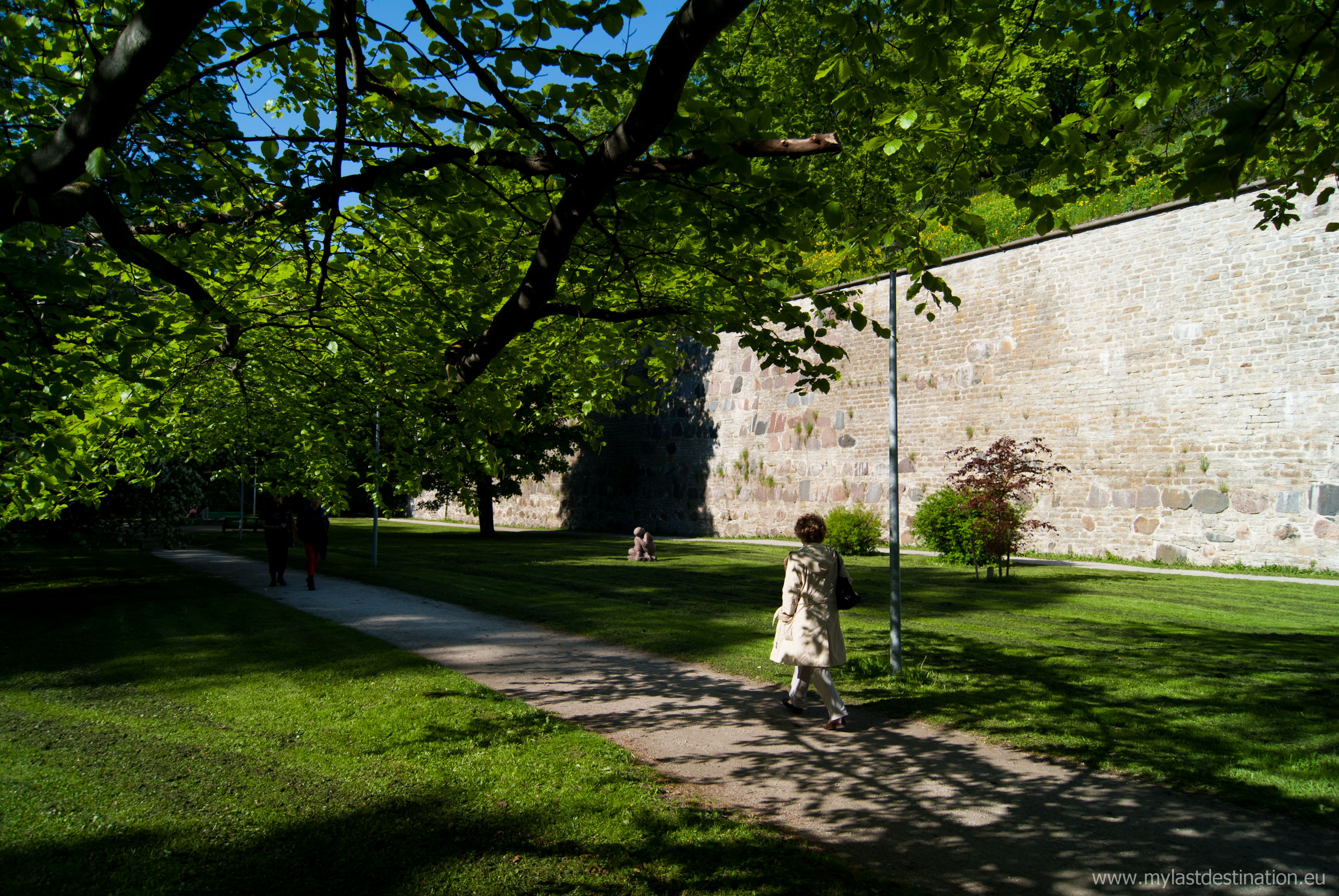 Hirvepark